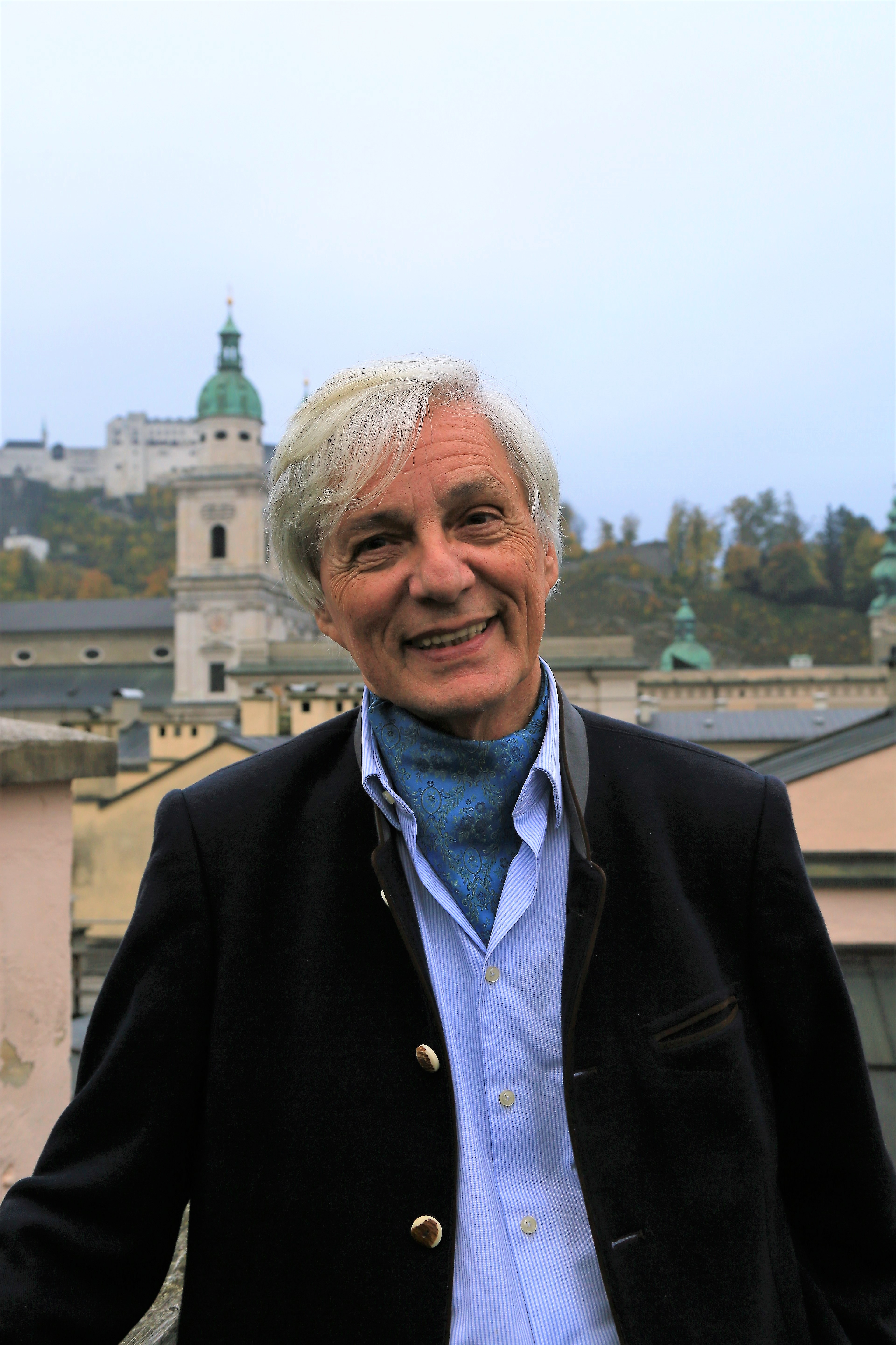 Josef Wallnig im Jahr 2018 mit dem Salzburger Dom im Hintergrund